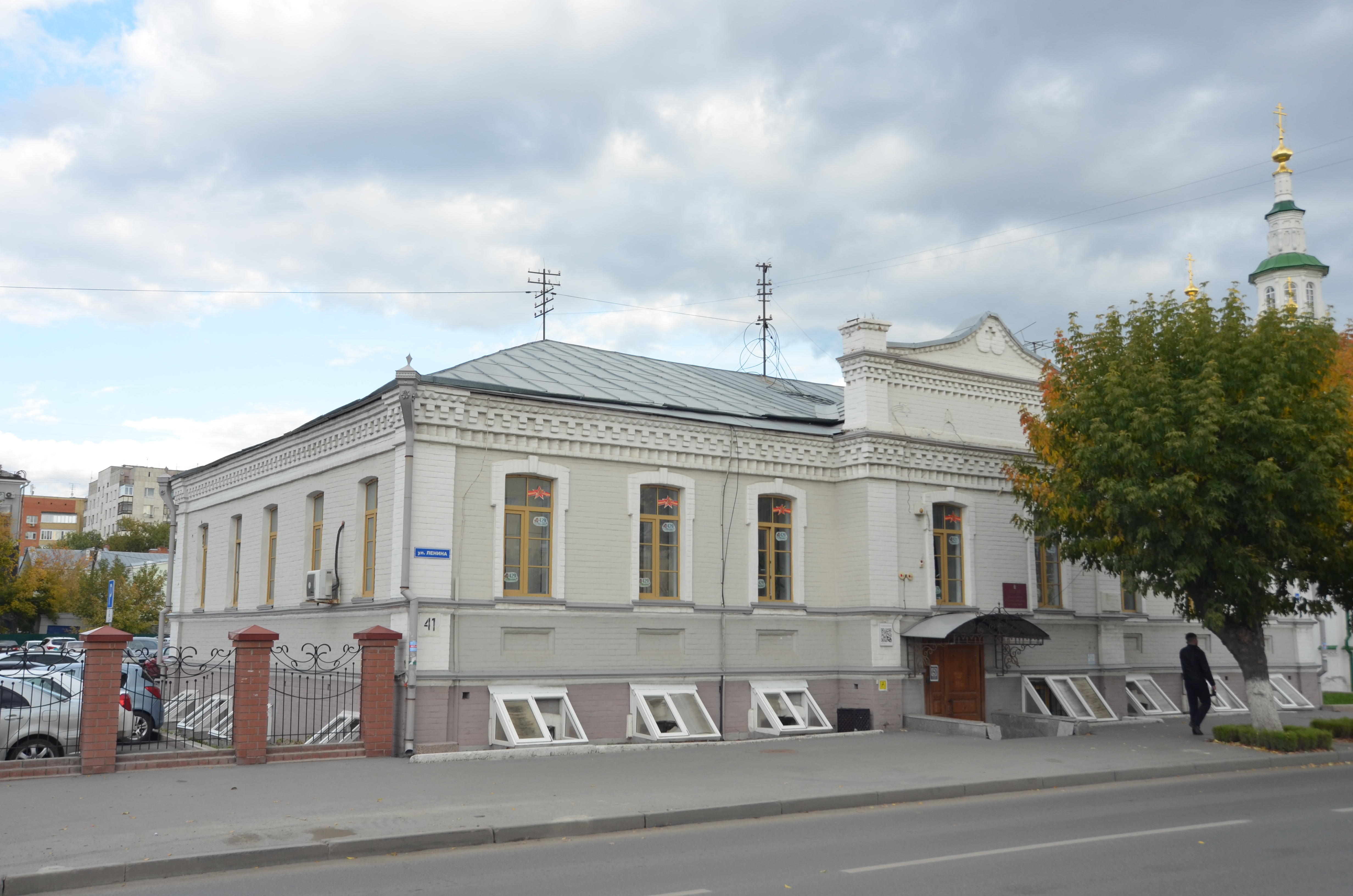 Спасская церковно-приходская школа: улица Ленина, 41, Тюмень, Тюменская область